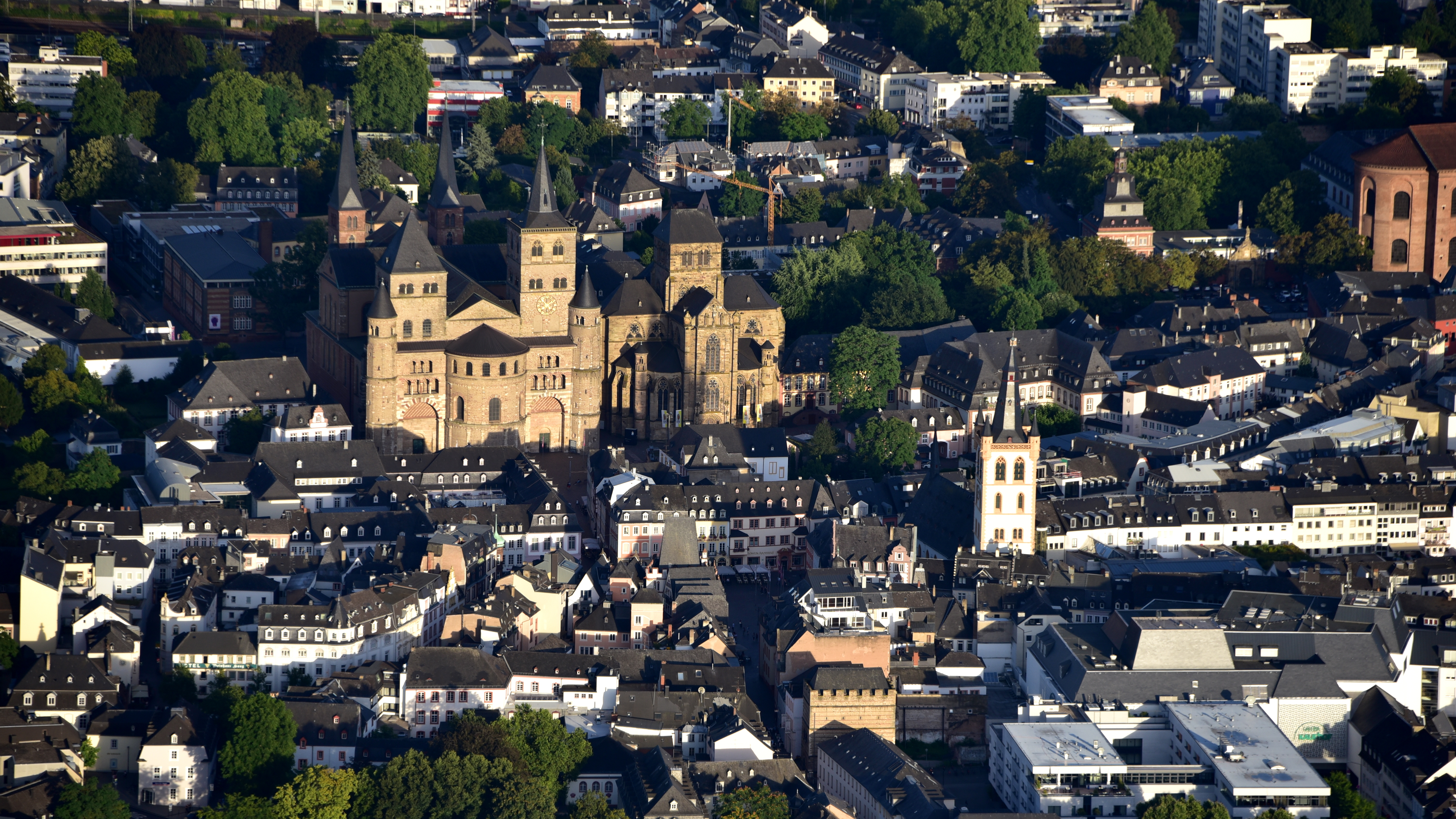 Trier, Trierer Dom, Luftaufnahme (2016)